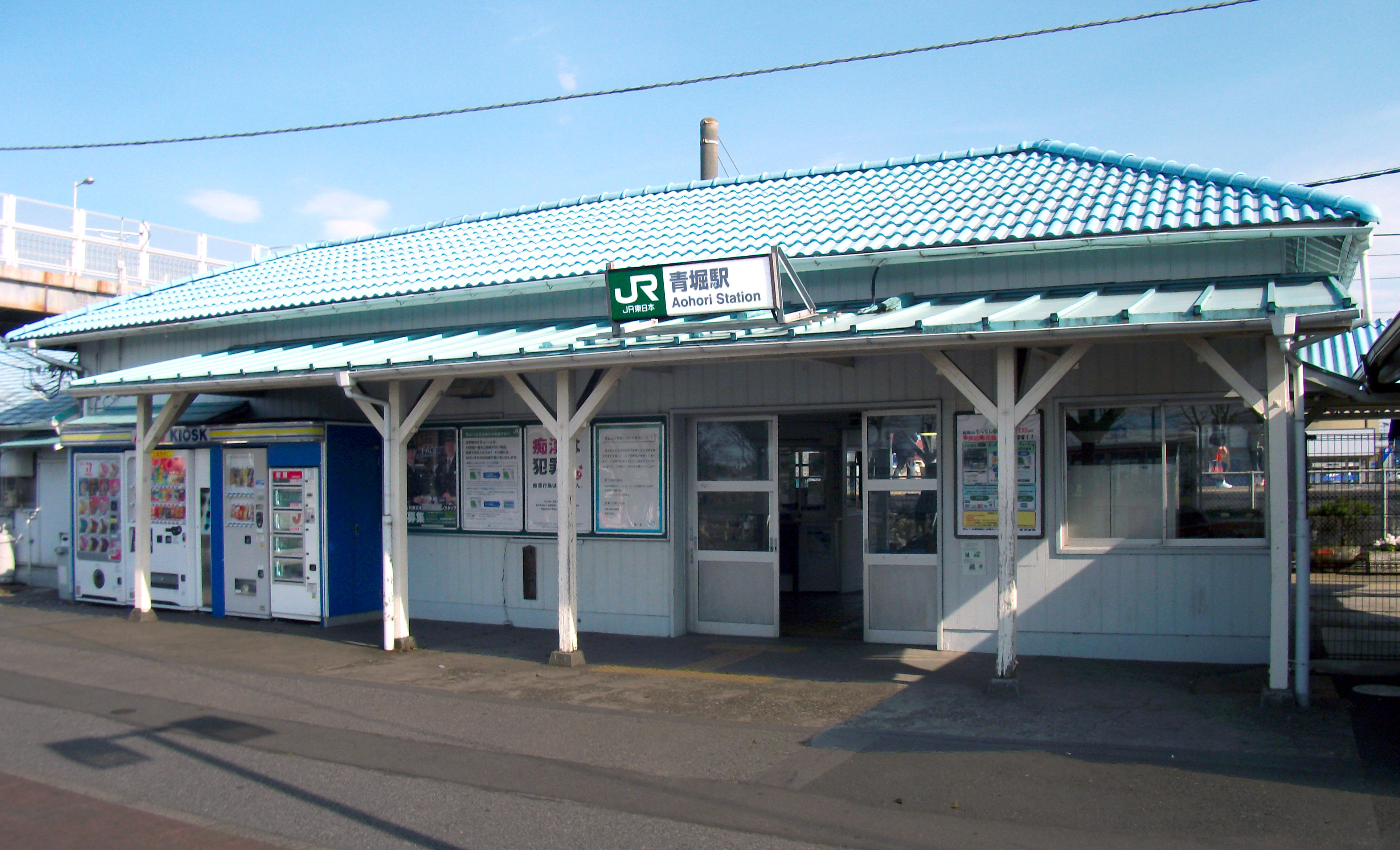 JR内房線 青堀駅駅舎